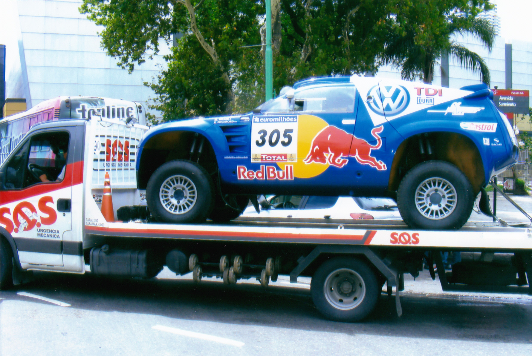 Das dritten platz Auto der Rallye Dakar 2010. Volkswagen Race Touareg, Mark Miller